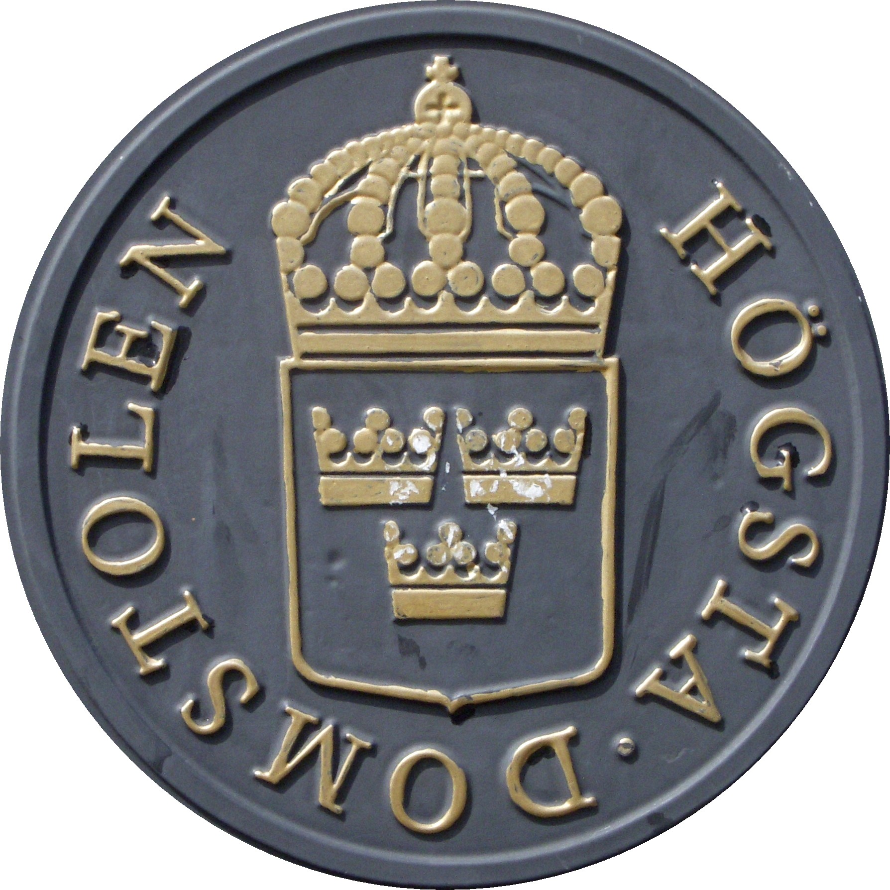 Skylt vid Högsta domstolen i Stockholm